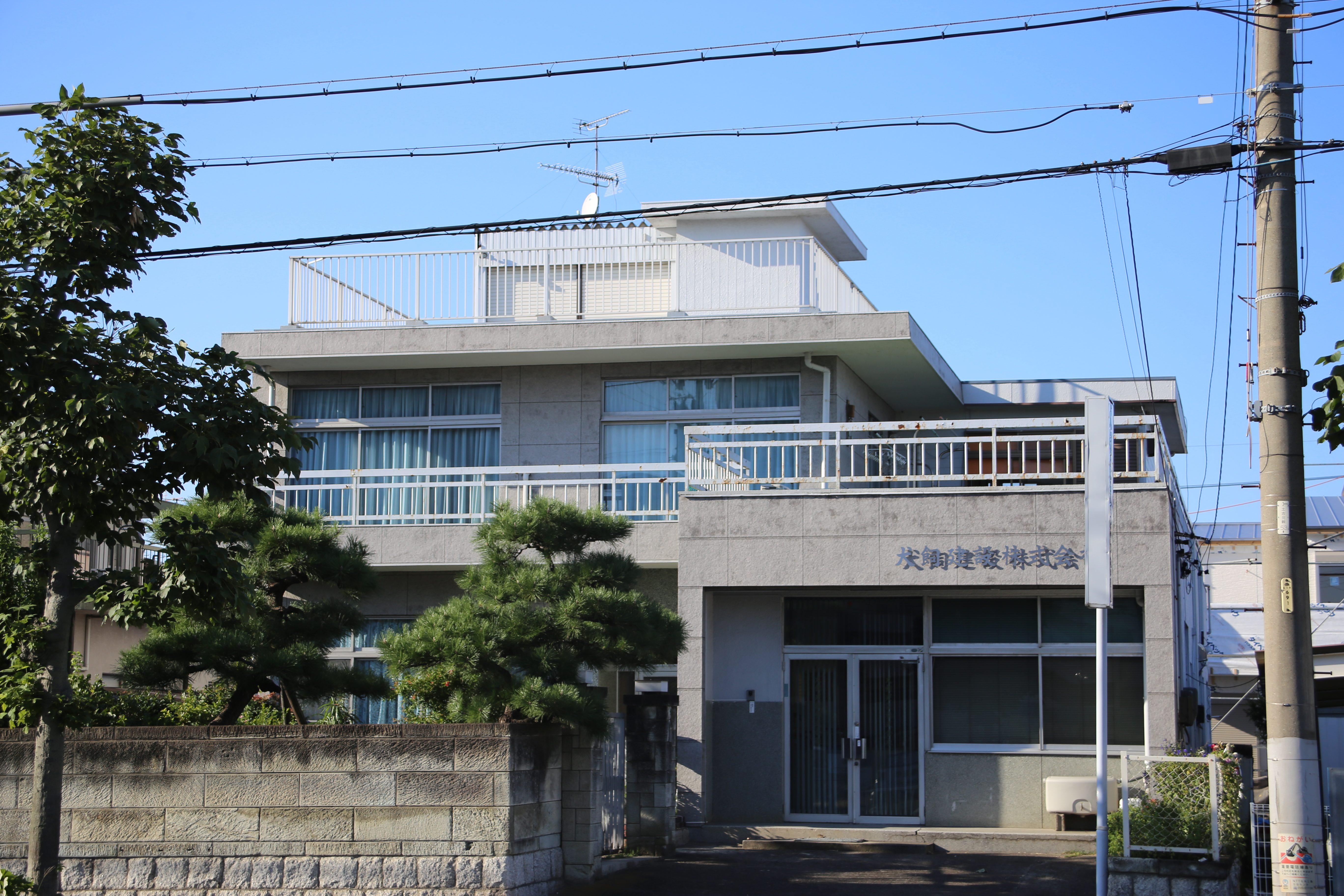 名古屋市港区明正の犬飼建設本社を南側公道より撮影